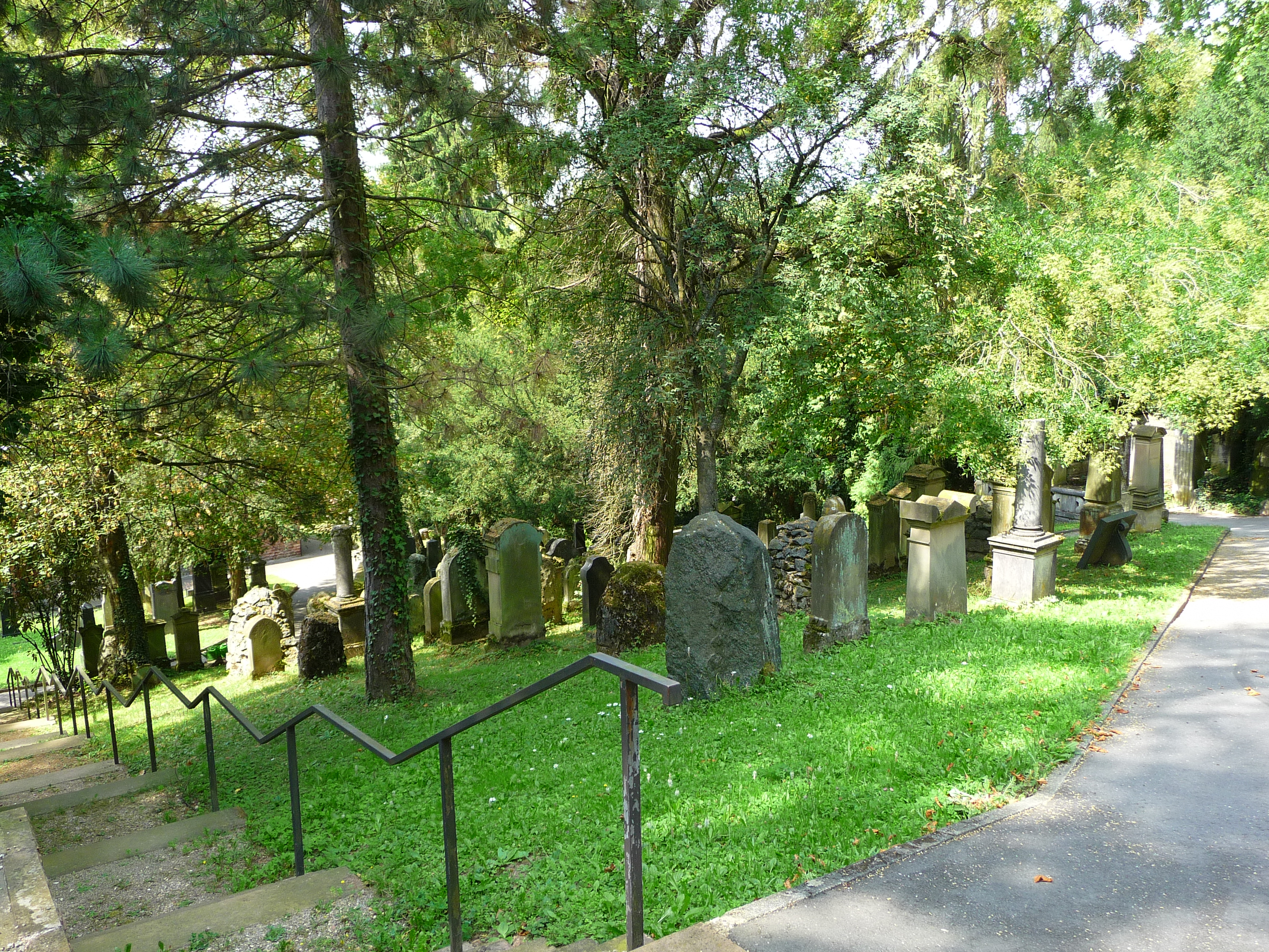 Gräberfeld auf dem Bergfriedhof in Heidelberg (Deutschland)